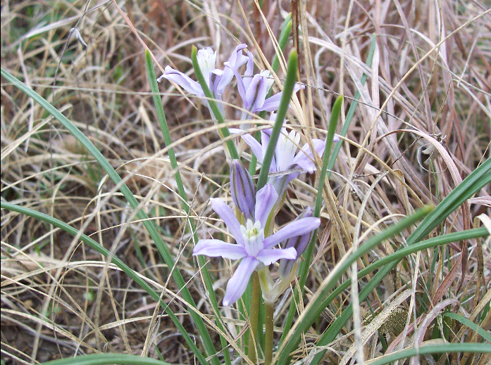 Androstephium coeruleum plant